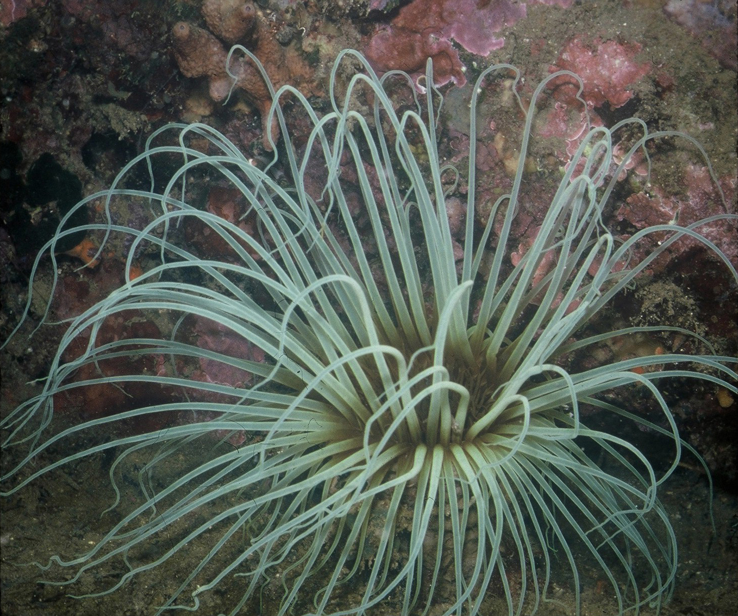 Cerianthus membranaceus Spallanzani, 1784 - Banyuls-sur-Mer : 08/81